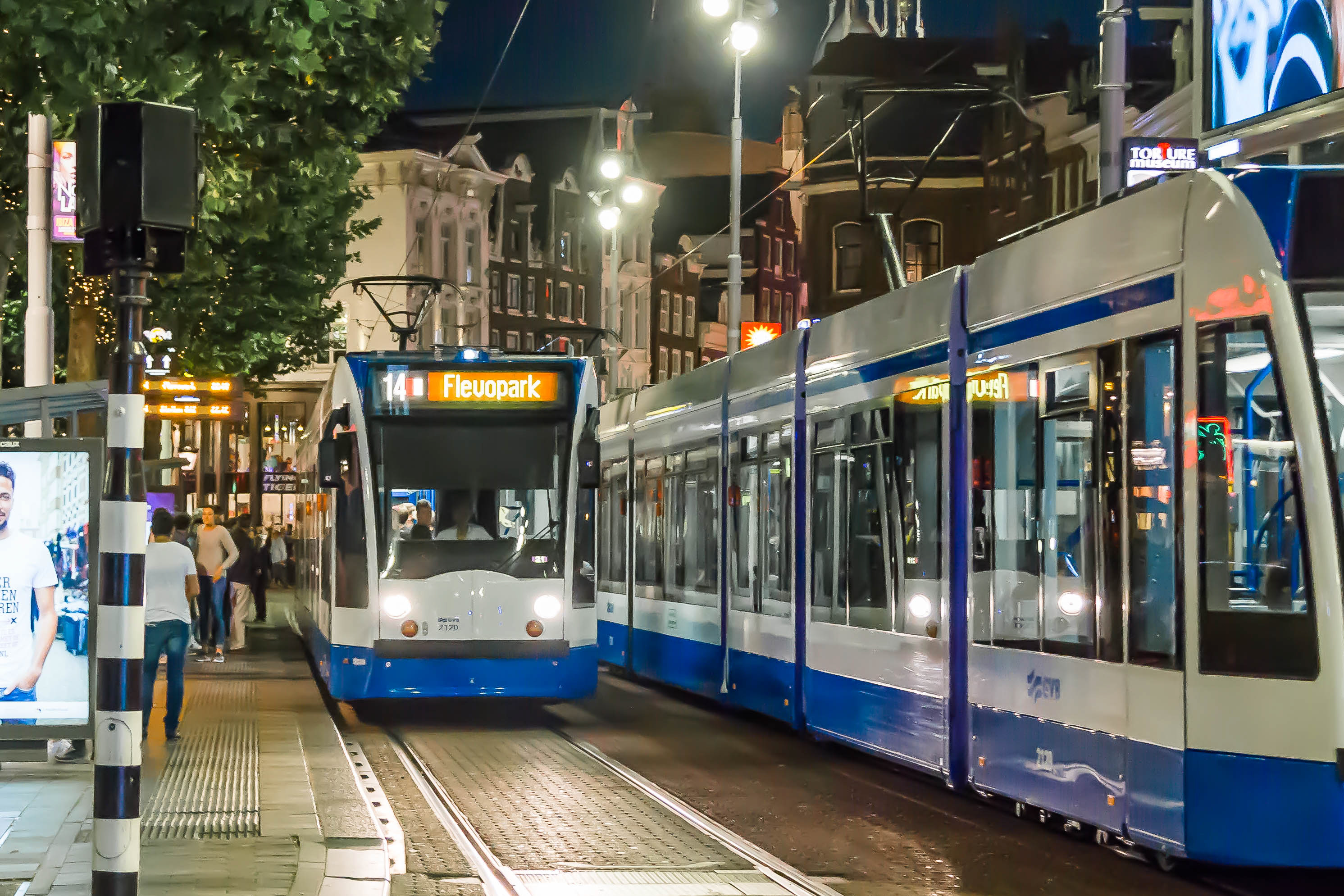 A Combino Tram in Amsterdam at Rembrandtplein in the night.